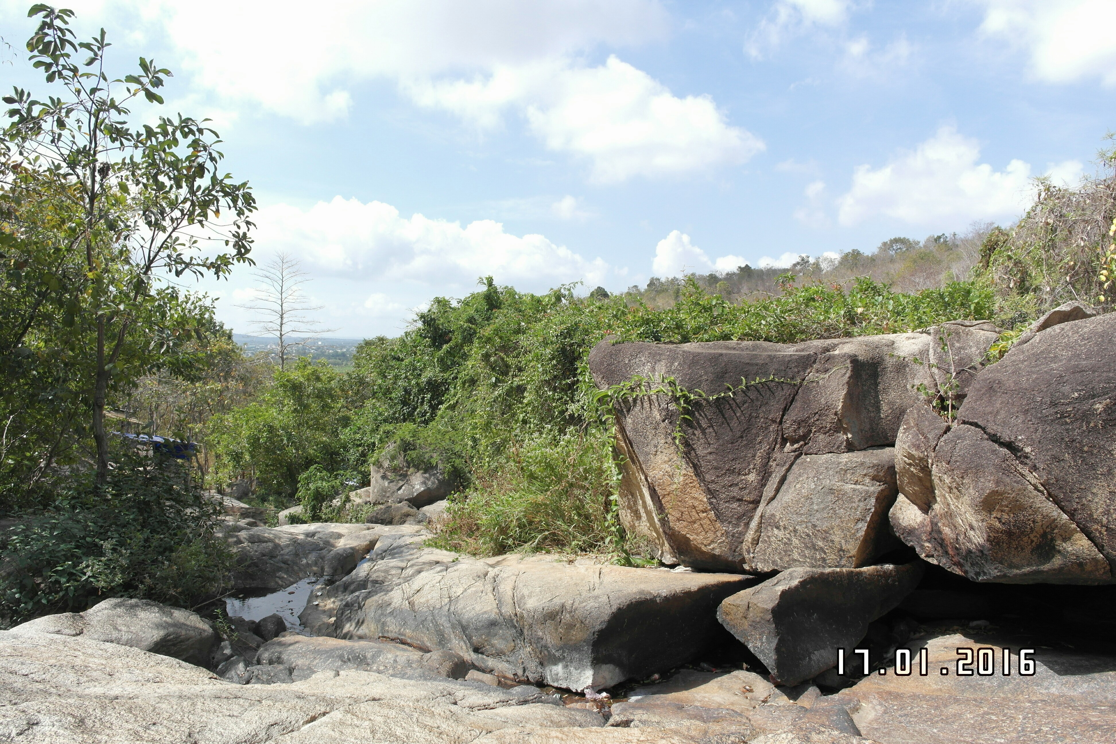 Suối Đá núi Dinh Bà Rịa